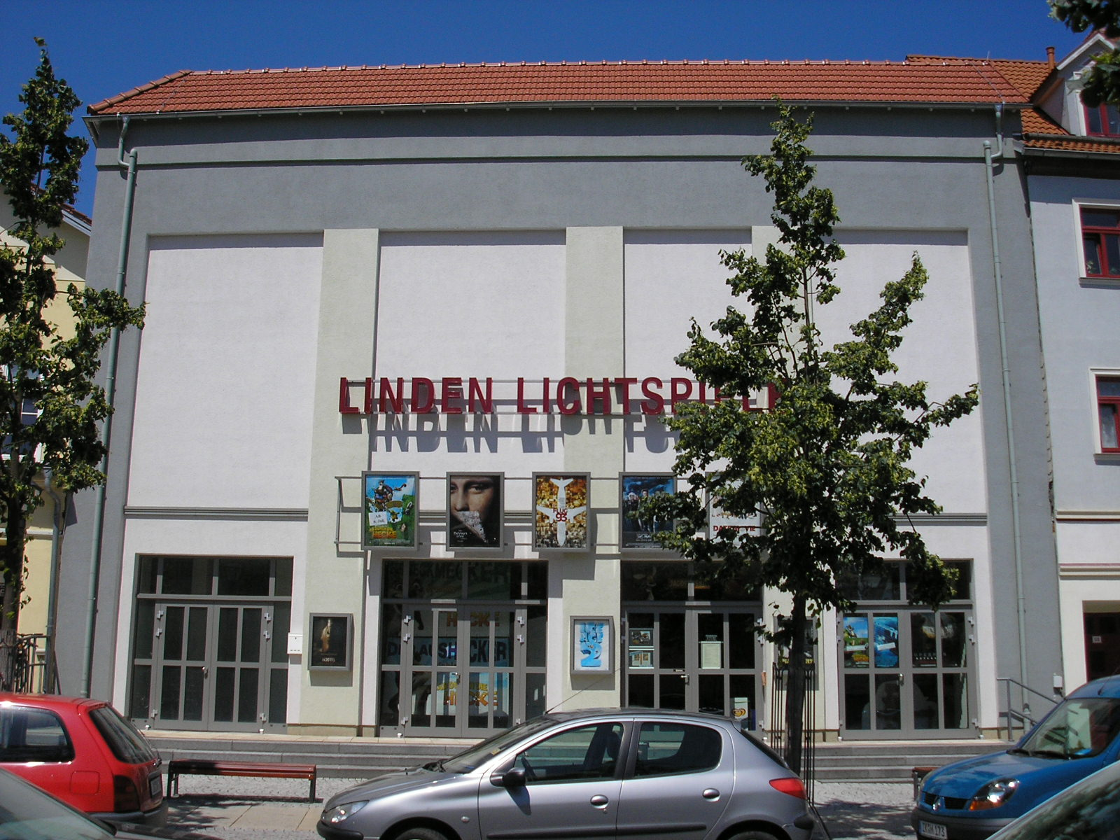 Das Kino "Lindenlichtspiele" in Ilmenau (Thüringen). Es ist das weltweit erste Kino mit der ISONO-3D-Klangtechnik. Quelle: selbst fotografiert